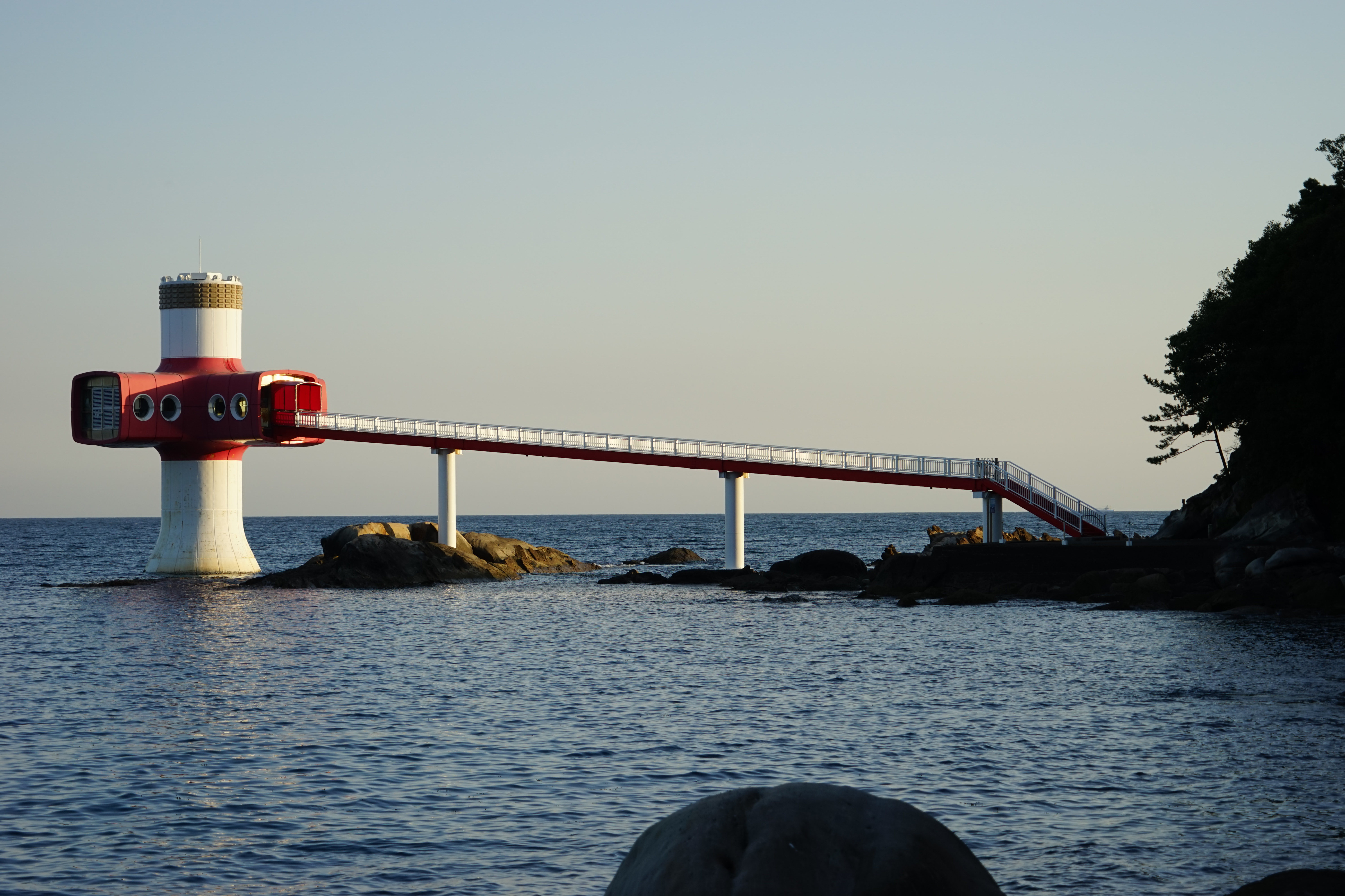 足摺海底館